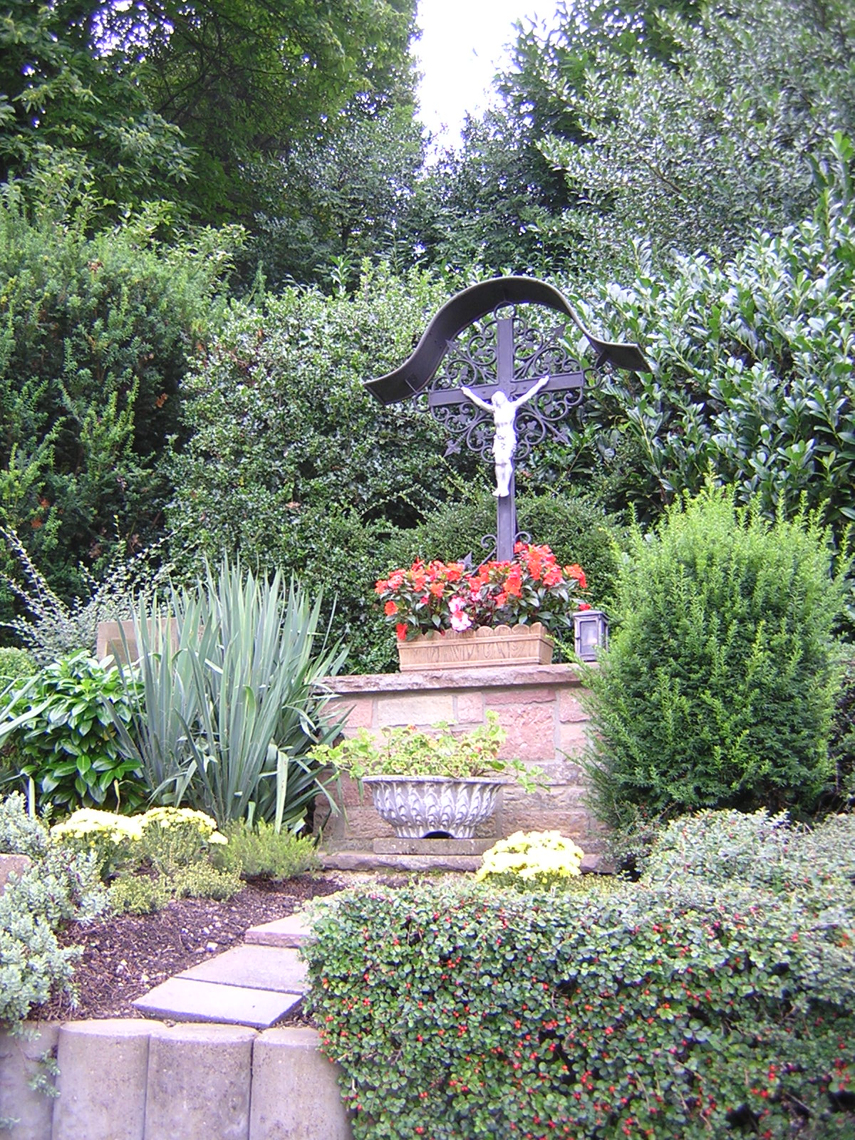 Gey - Kreuz